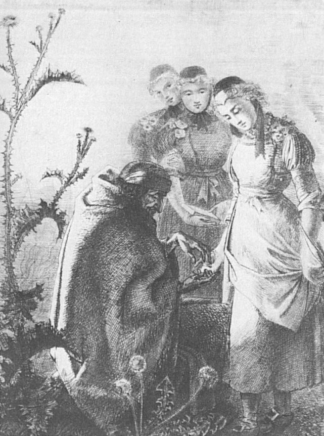 Die alte Zigeunerin Lore aus Ungedanken liest einem Mädchen aus der Hand. Im Hintergrund zwei weitere Mädchen